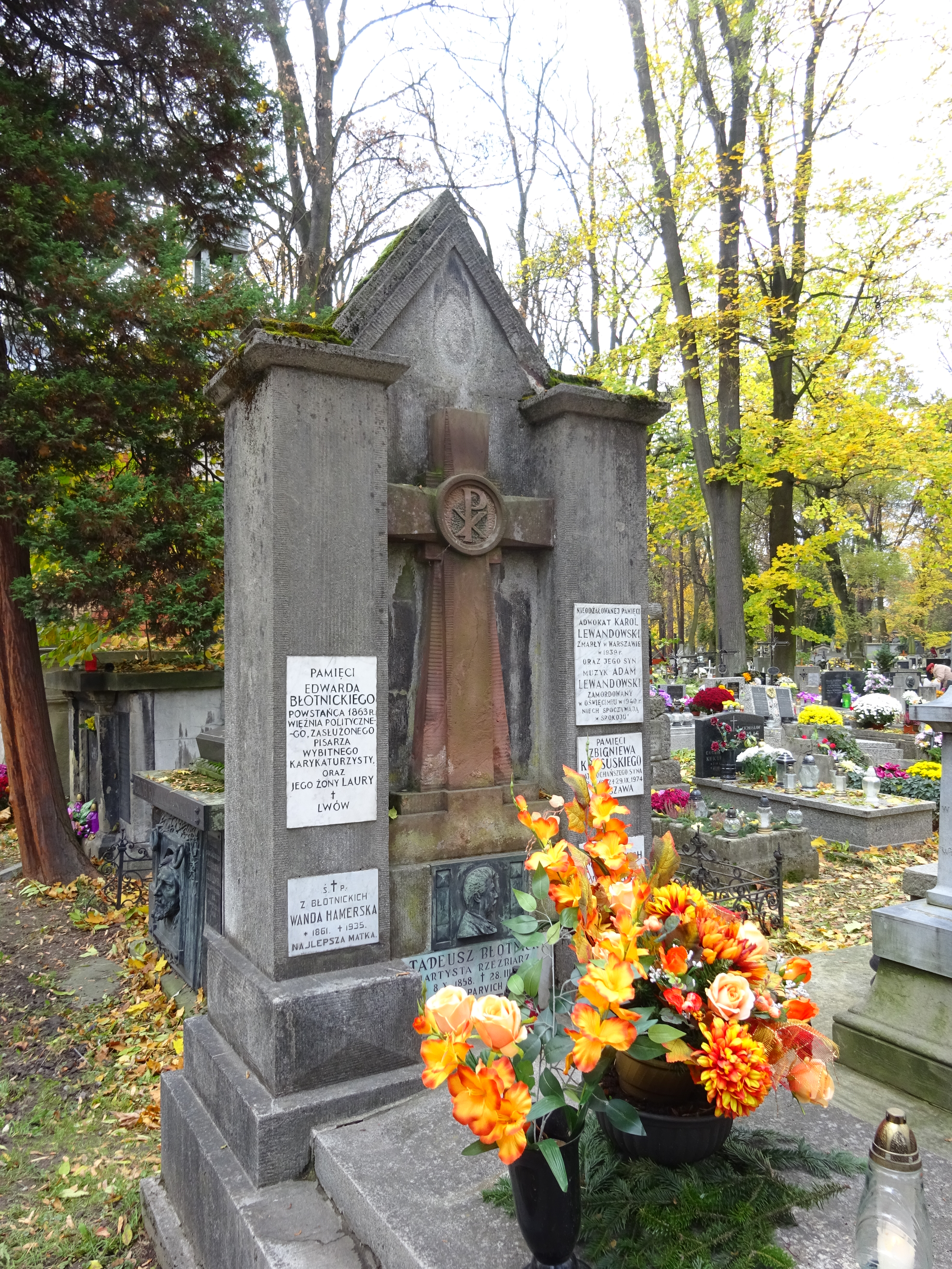 Grobowiec rzeźbiarza Tadeusza Błotnickiego na Cmentarzu Rakowickim w Krakowie. 2016